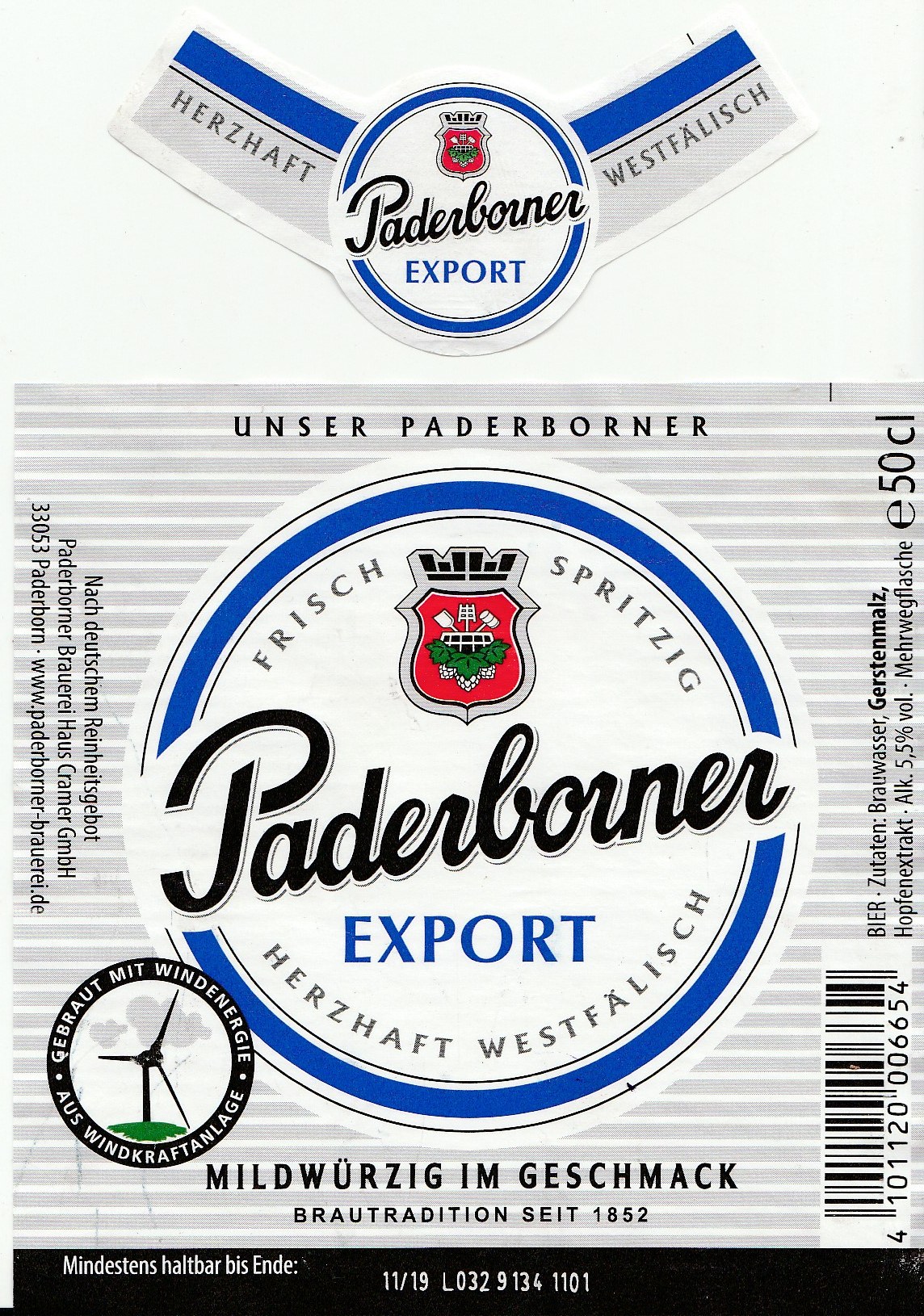 Ein Etikett der Paderborner Brauerei Haus Cramer, Paderborner Export, von 2019.